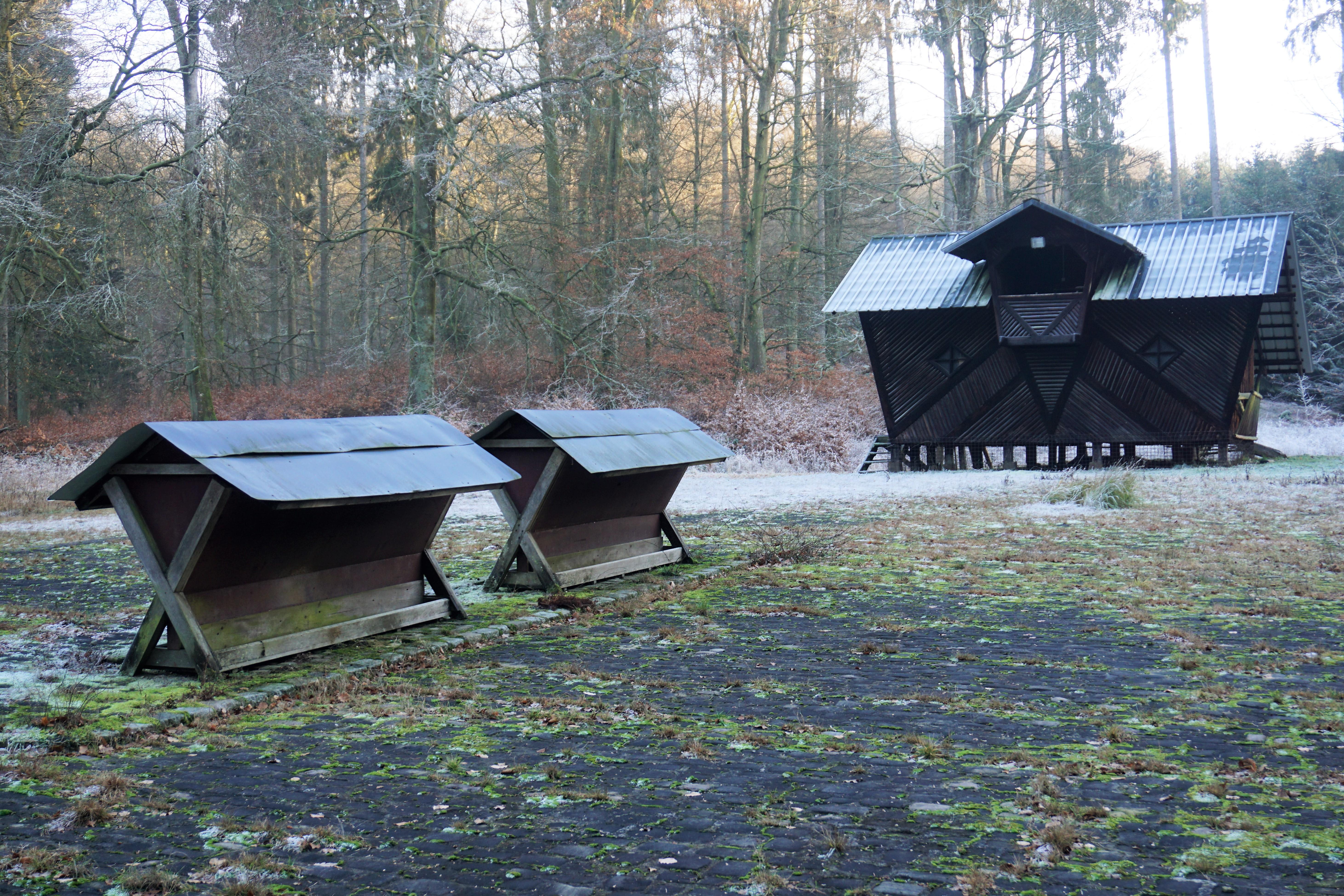 Grunewald, aire d'agrainage près du Déiwendallerwee, commune de Steinsel.